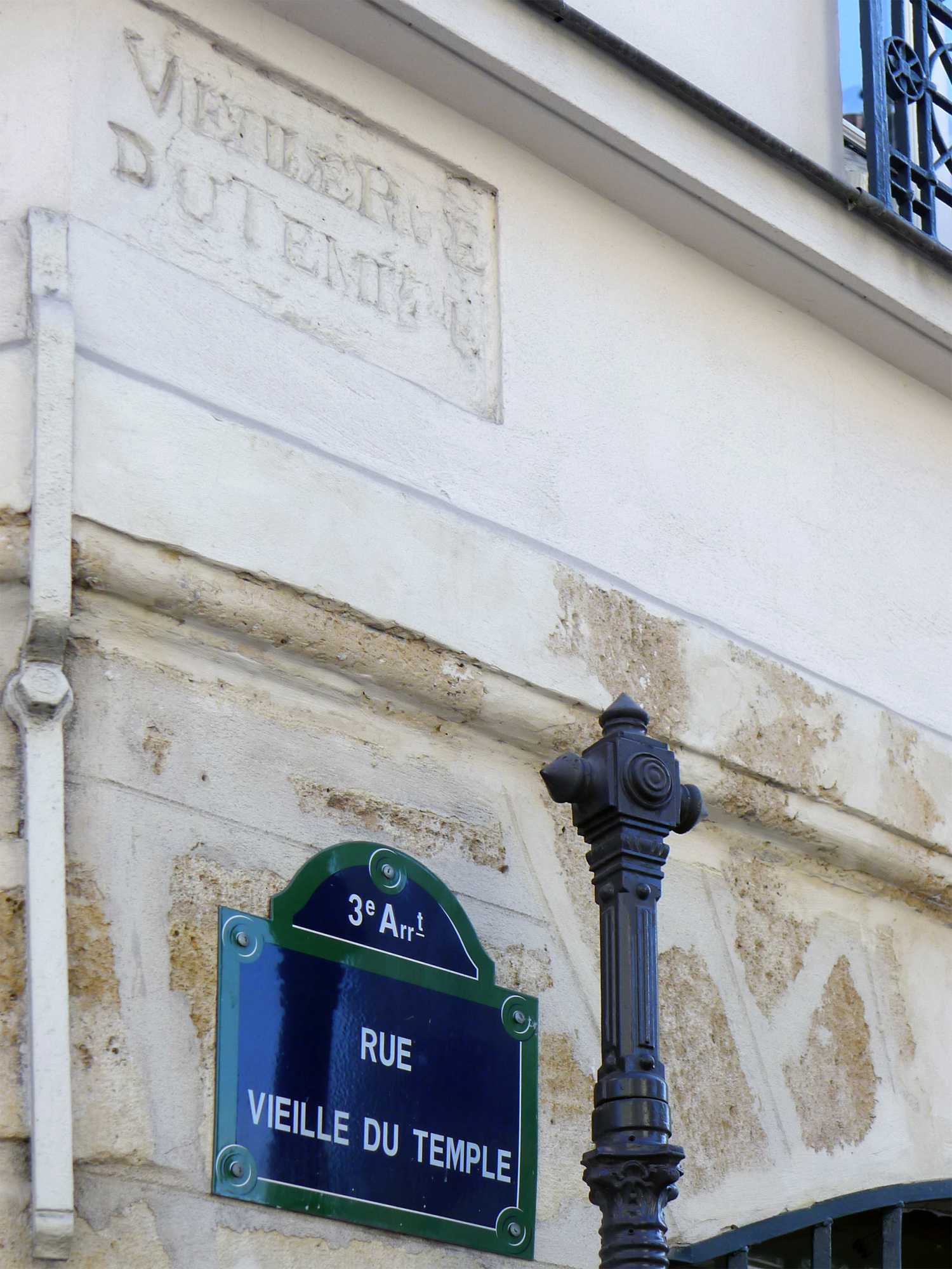 Rue Vieille du Temple (plaque actuelle et ancien nom) - Paris III